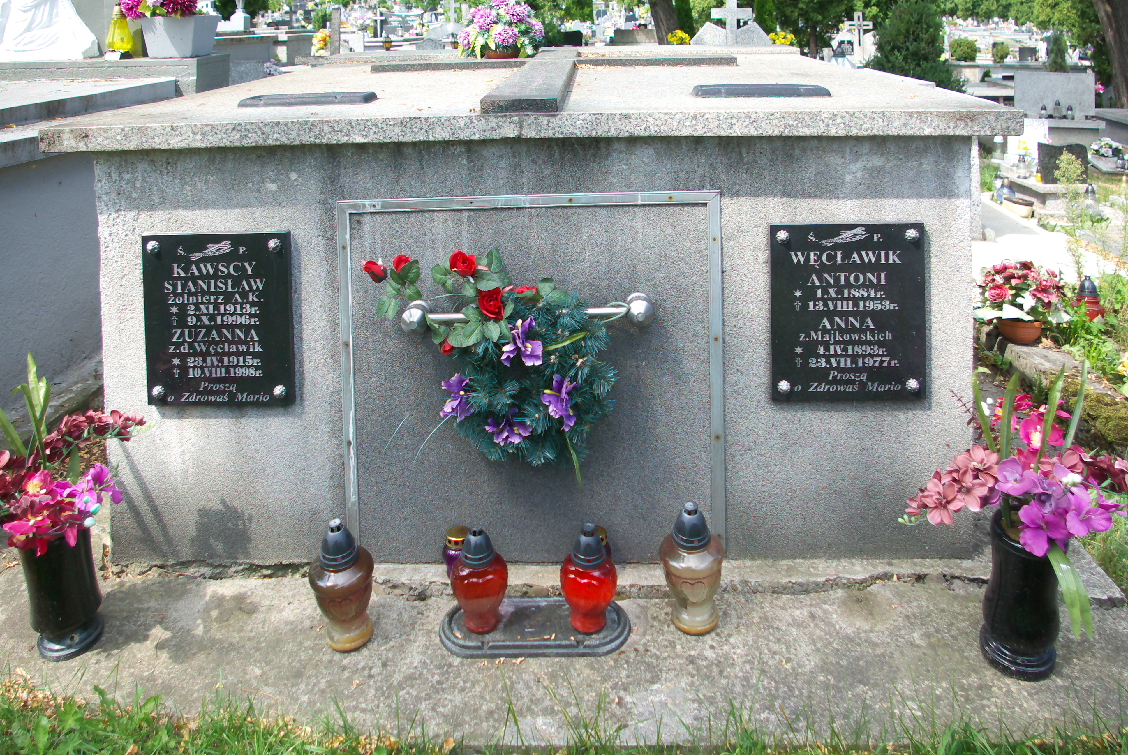 Grobowiec rodziny Kawskich i Węcławik w części „Matejki Stary” Cmentarza Centralnego w Sanoku.